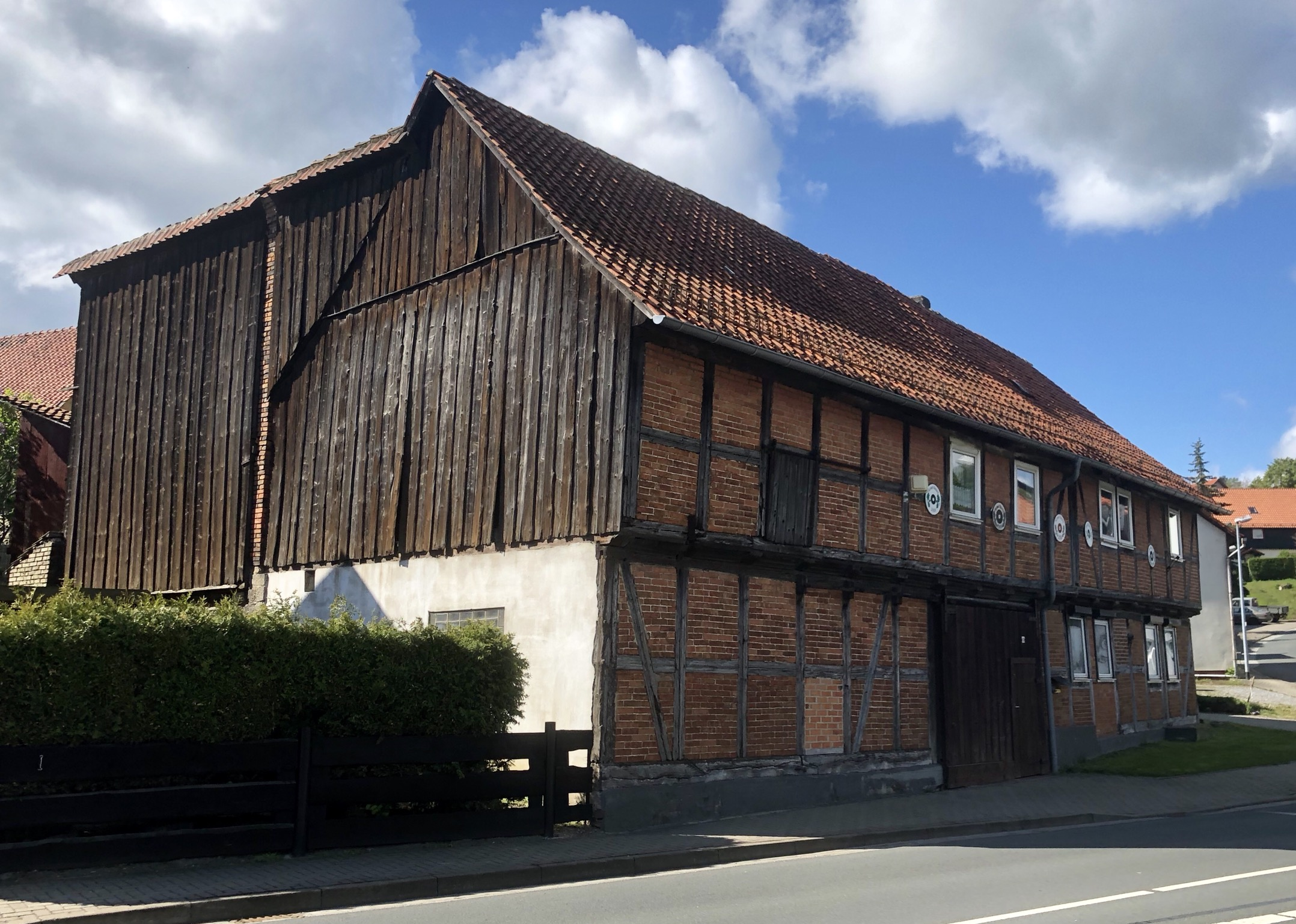 Wilhelm-Pieck-Straße 38 in Heimburg